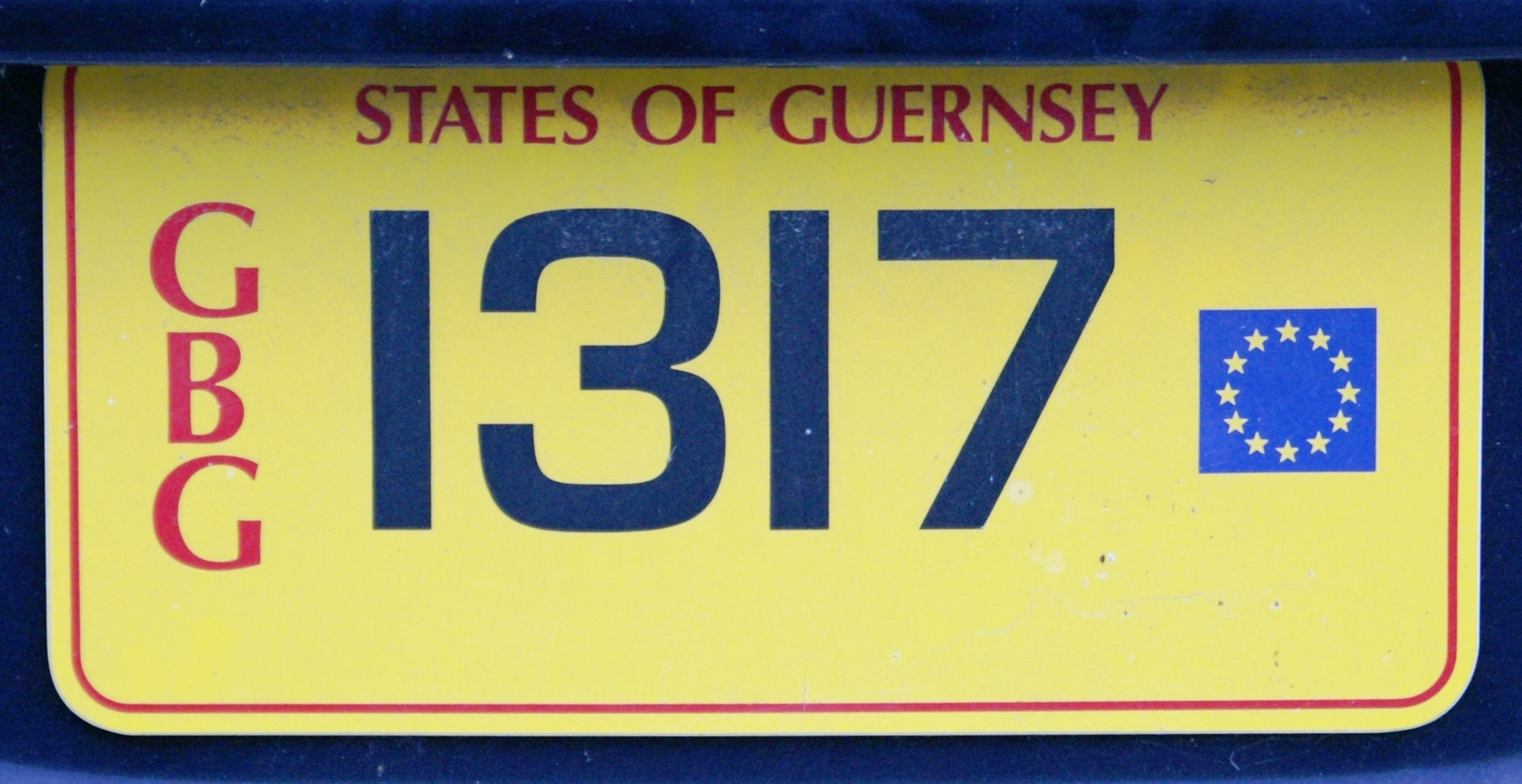 Guernsey kentekenplaat